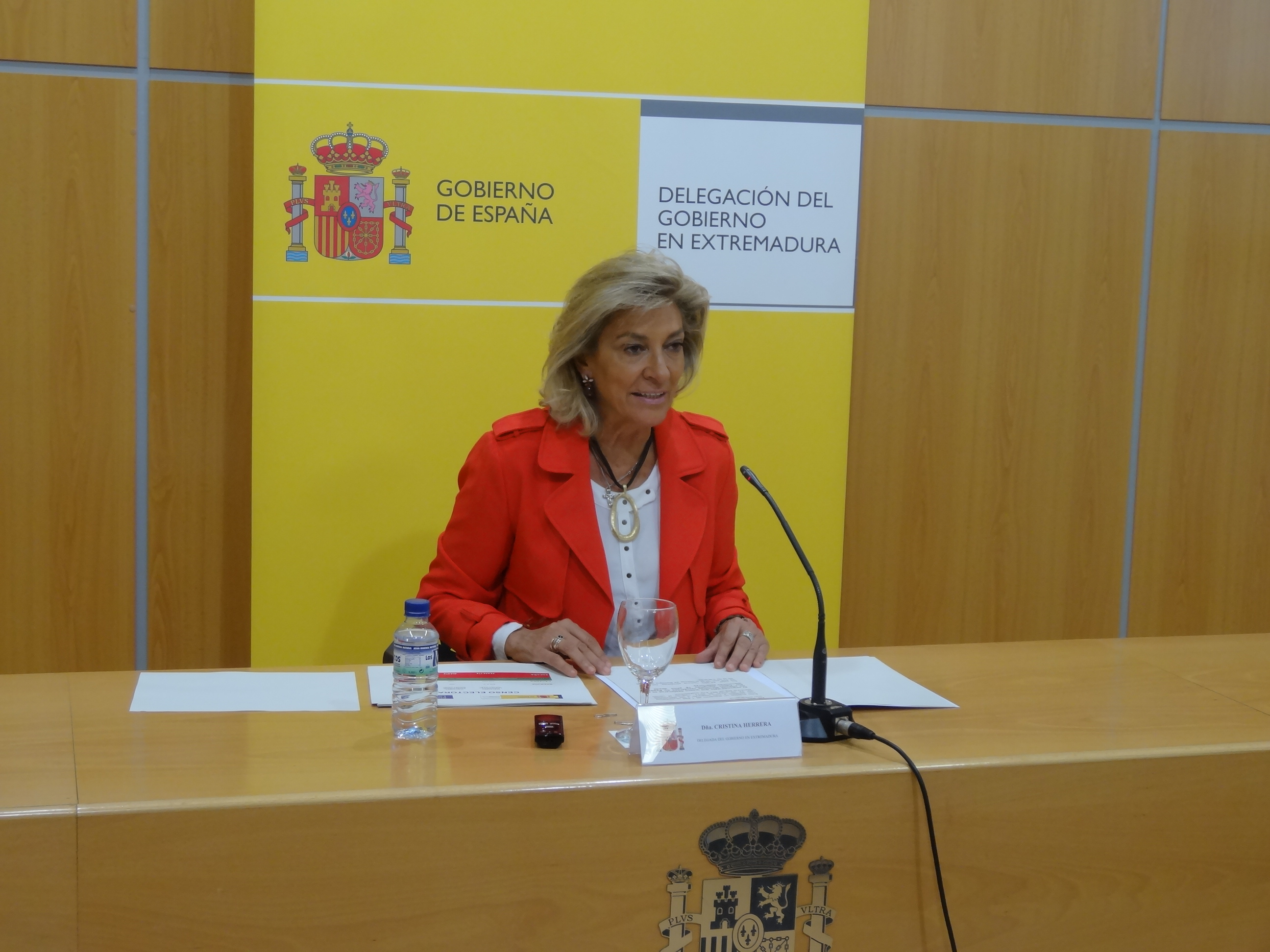 La delegada del Gobierno en rueda de prensa.